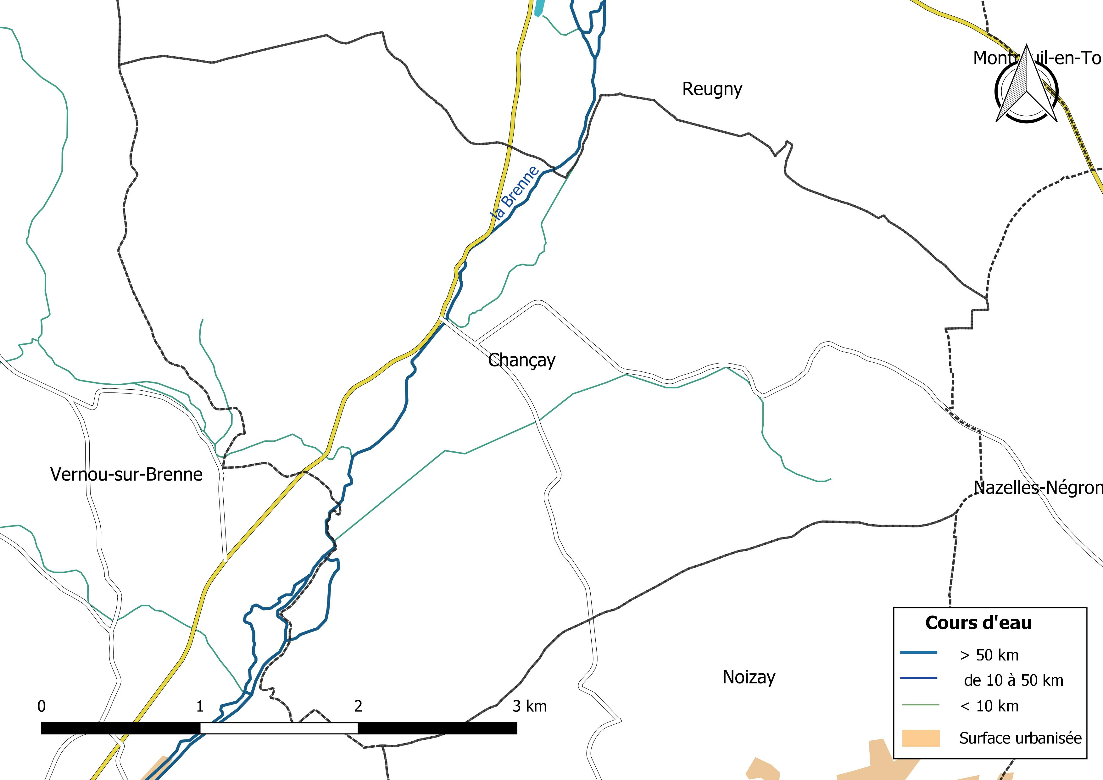 Carte du réseau hydrographique de la commune de Chançay (France).